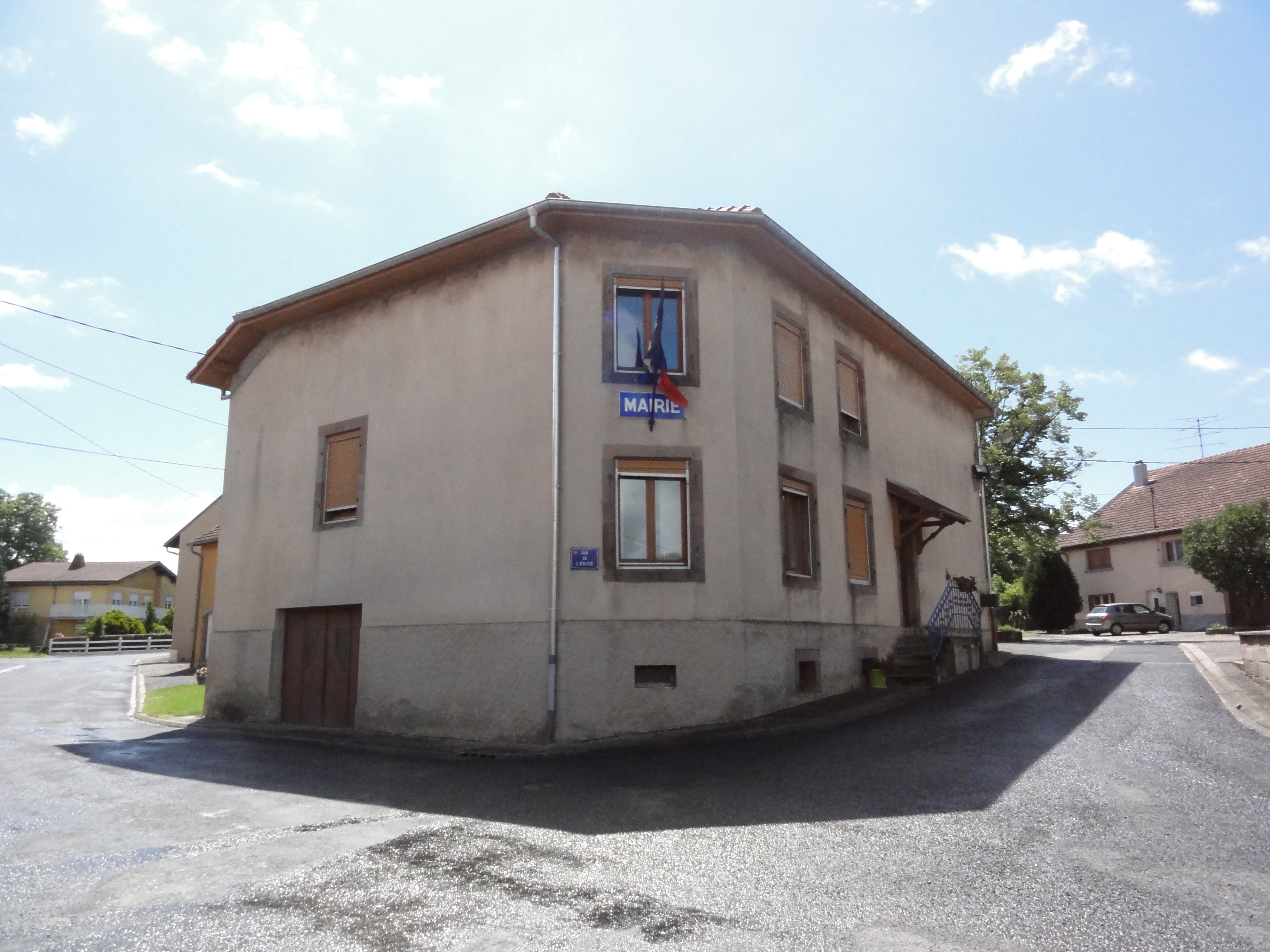 Brouviller (Moselle) mairie